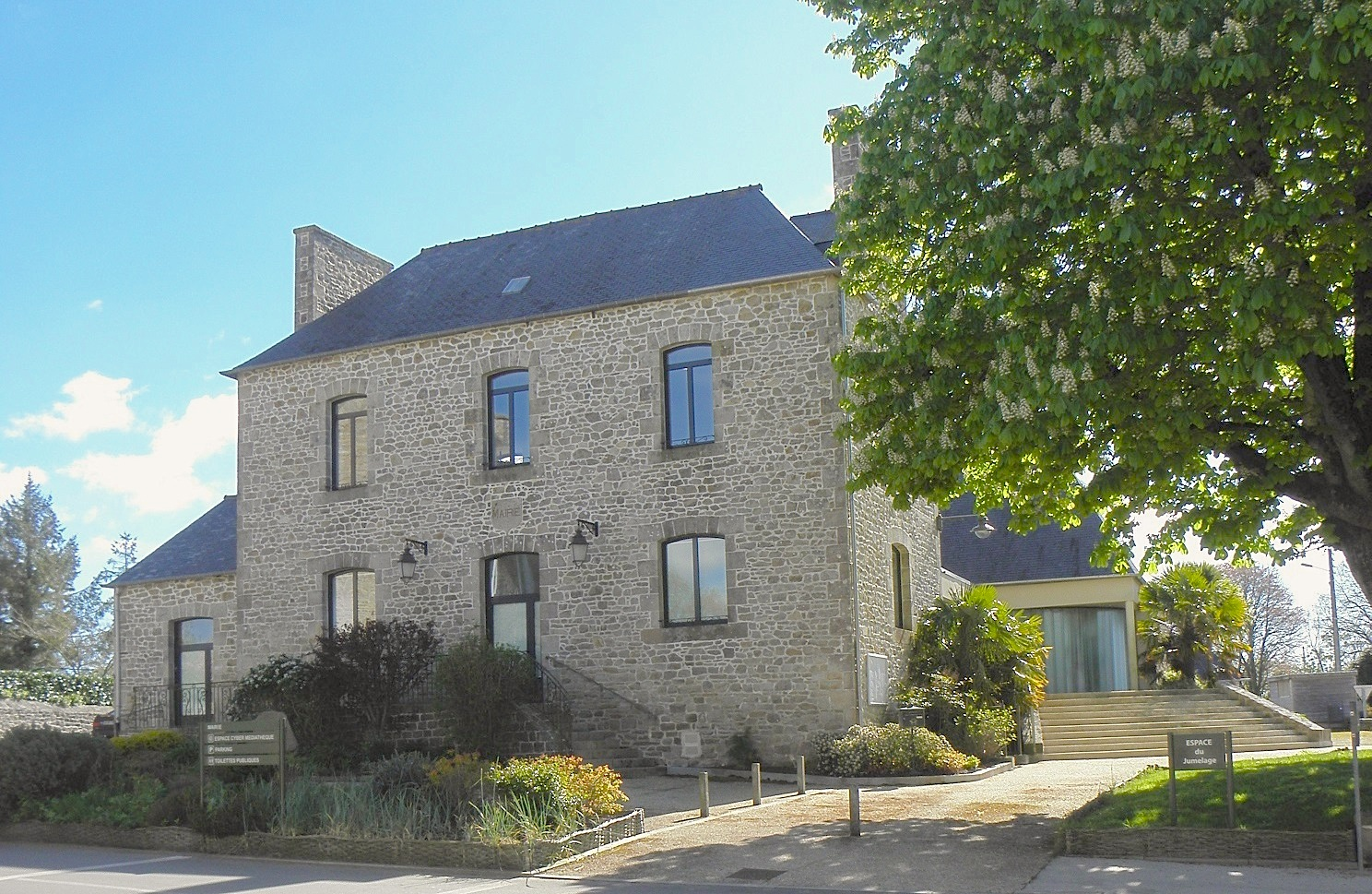 Mairie de Mégrit (22).